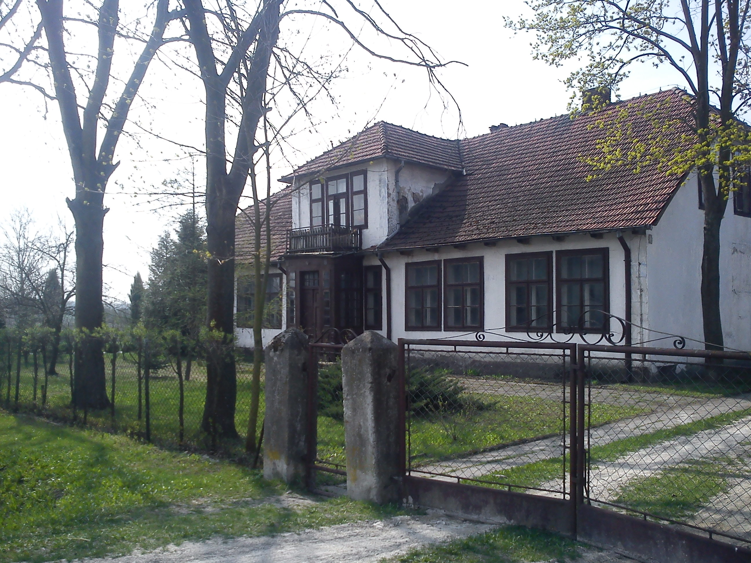 Budynek starej szkoły w Kobylnikach